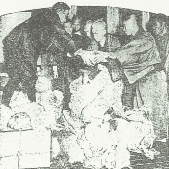 Kabocha Chinjōdan